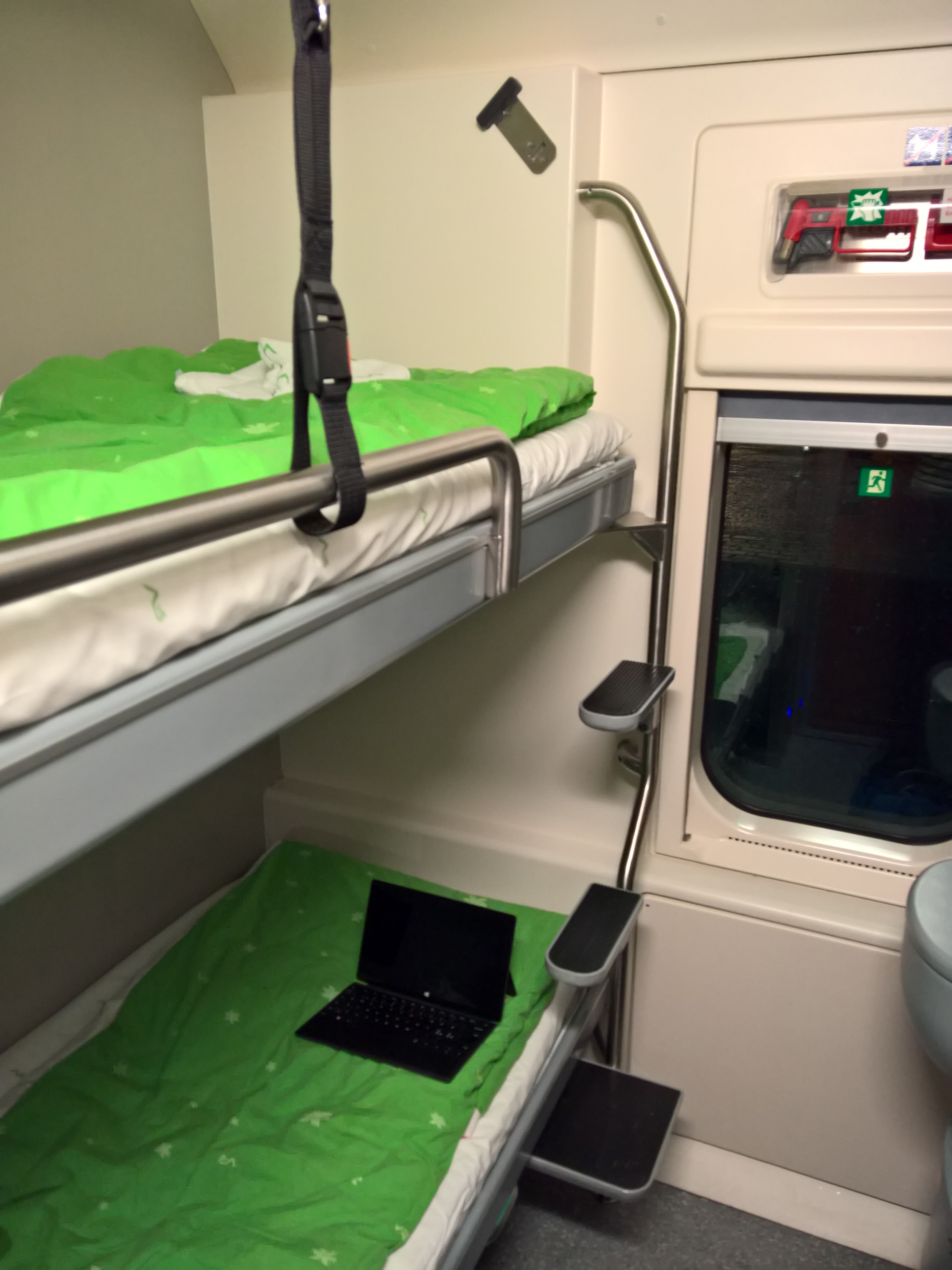 VR:n uuden kaksikerroksisen makuuvaunun hytti. Hyttiin mahtuu kaksi ihmistä, yläkerran hyteissä on oma WC ja suihku.